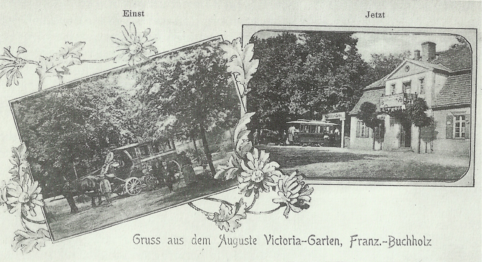 Postkarte des Auguste-Victoria-Gartens in Französisch-Buchholz